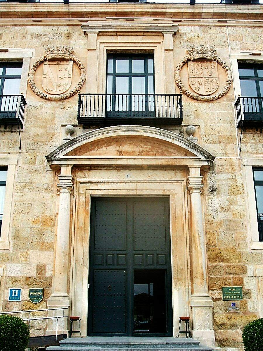 Palacio Ducal, Lerma (Burgos)